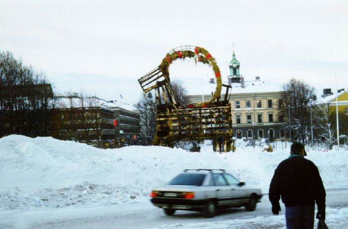 Julbocken i Gävle efter att den brunnit julen -98. Man ser de stora snöhögarna efter snöovädret. Foto: Mikael Johansson